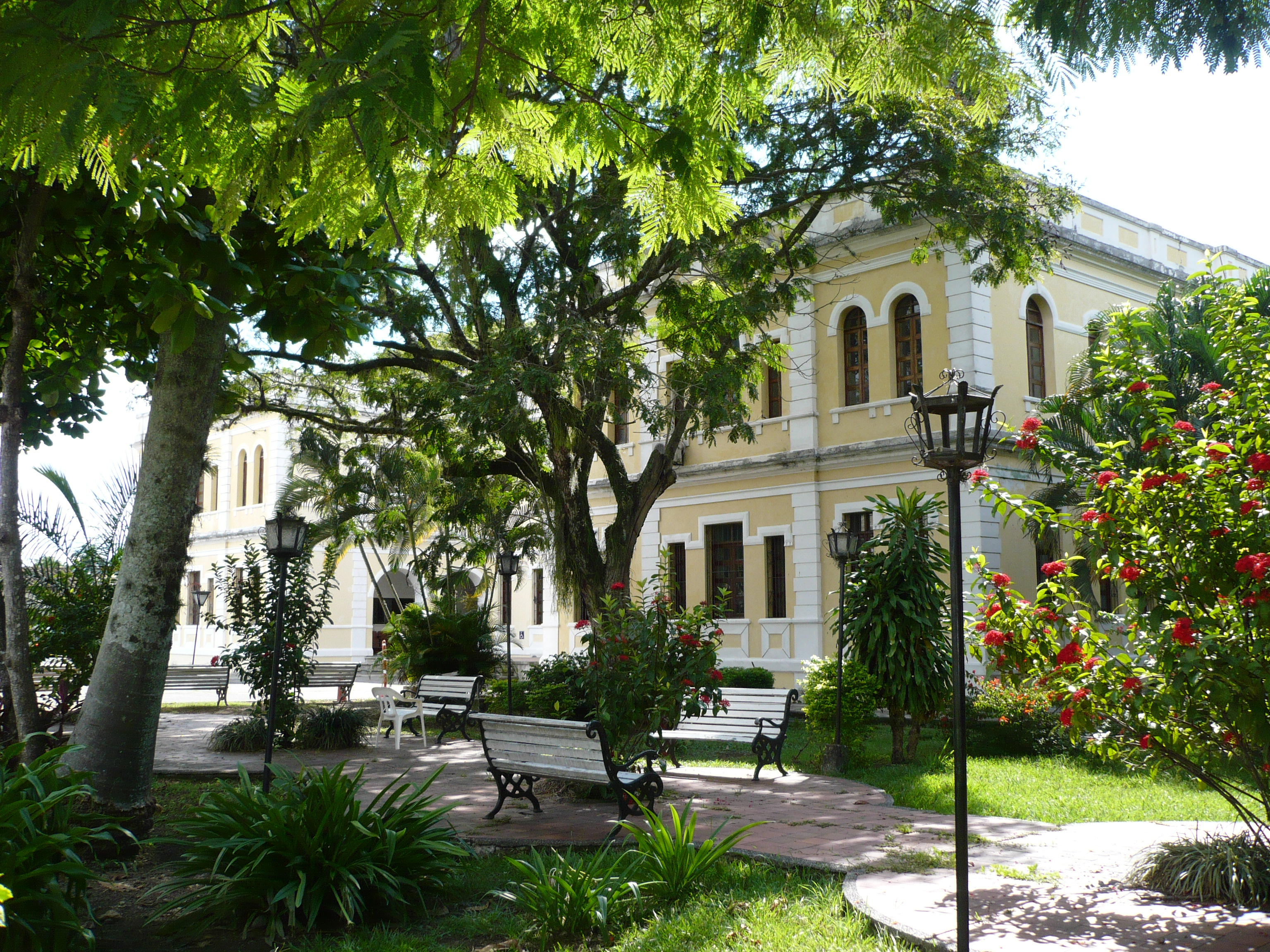 Alcaldía Municipal, Calle. 8 # 6-52, Cartago, Valle del Cauca, Colombia.